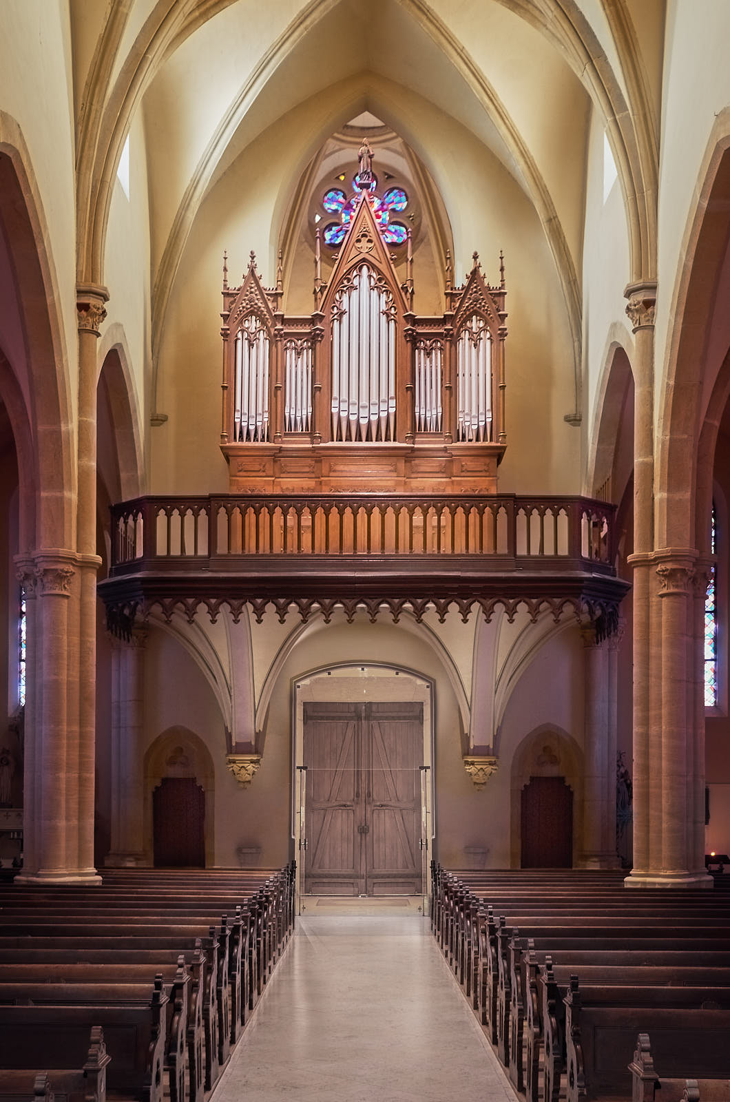 Orgue de tribune de l'église Saint Brice à Marly en Moselle, France